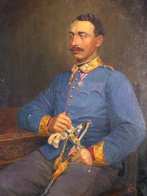 Ludwig Graf Trani